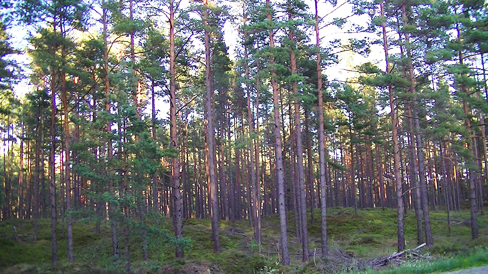 Мыс Колка (Латвия) Молодой сосновый лесок на закате